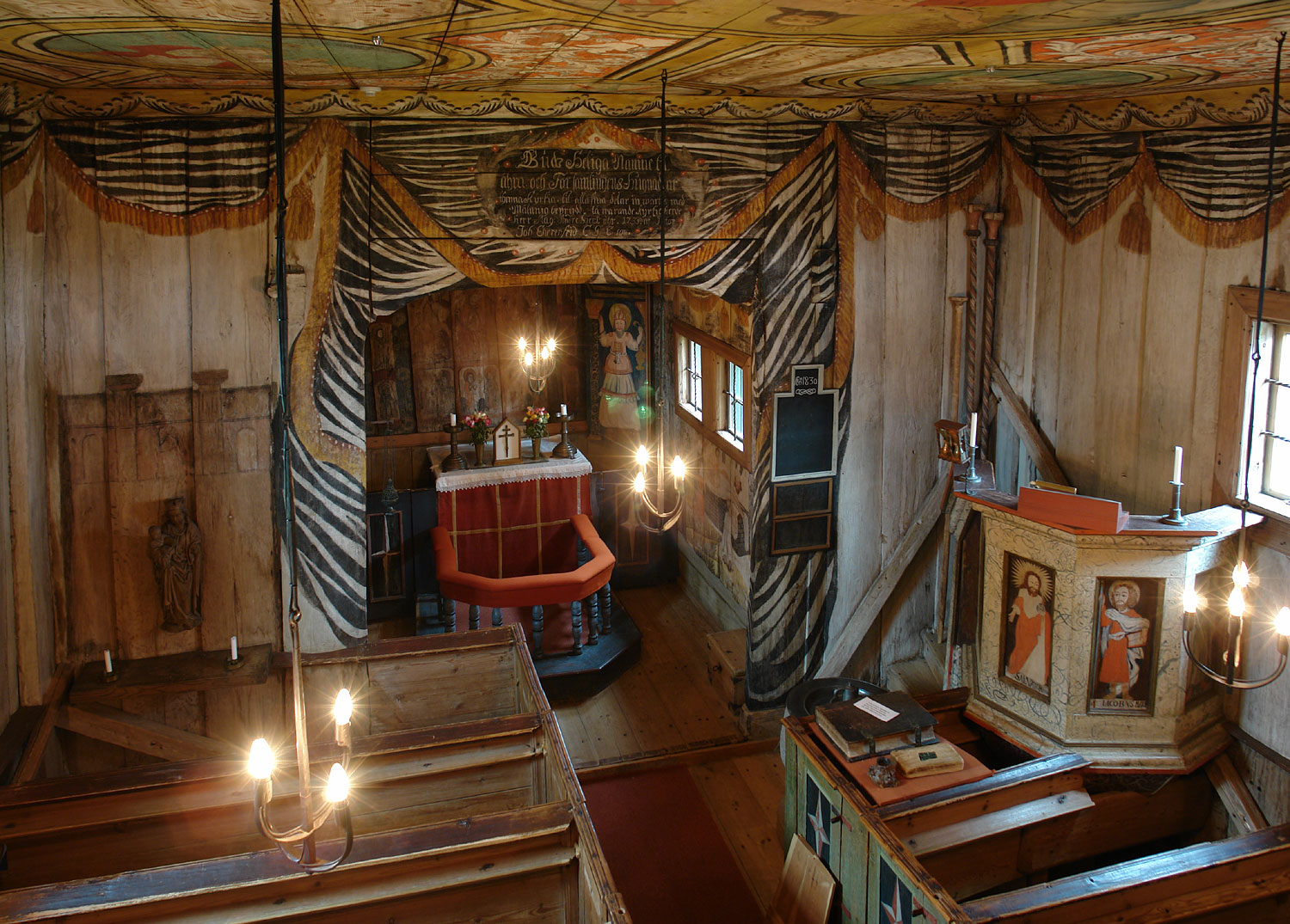 Die Stabkirche Hedared von 1506 ist die einzige erhaltene mittelalterliche Kirche dieser Bauart in Schweden.Inventar aus dem 12.-18.Jh.